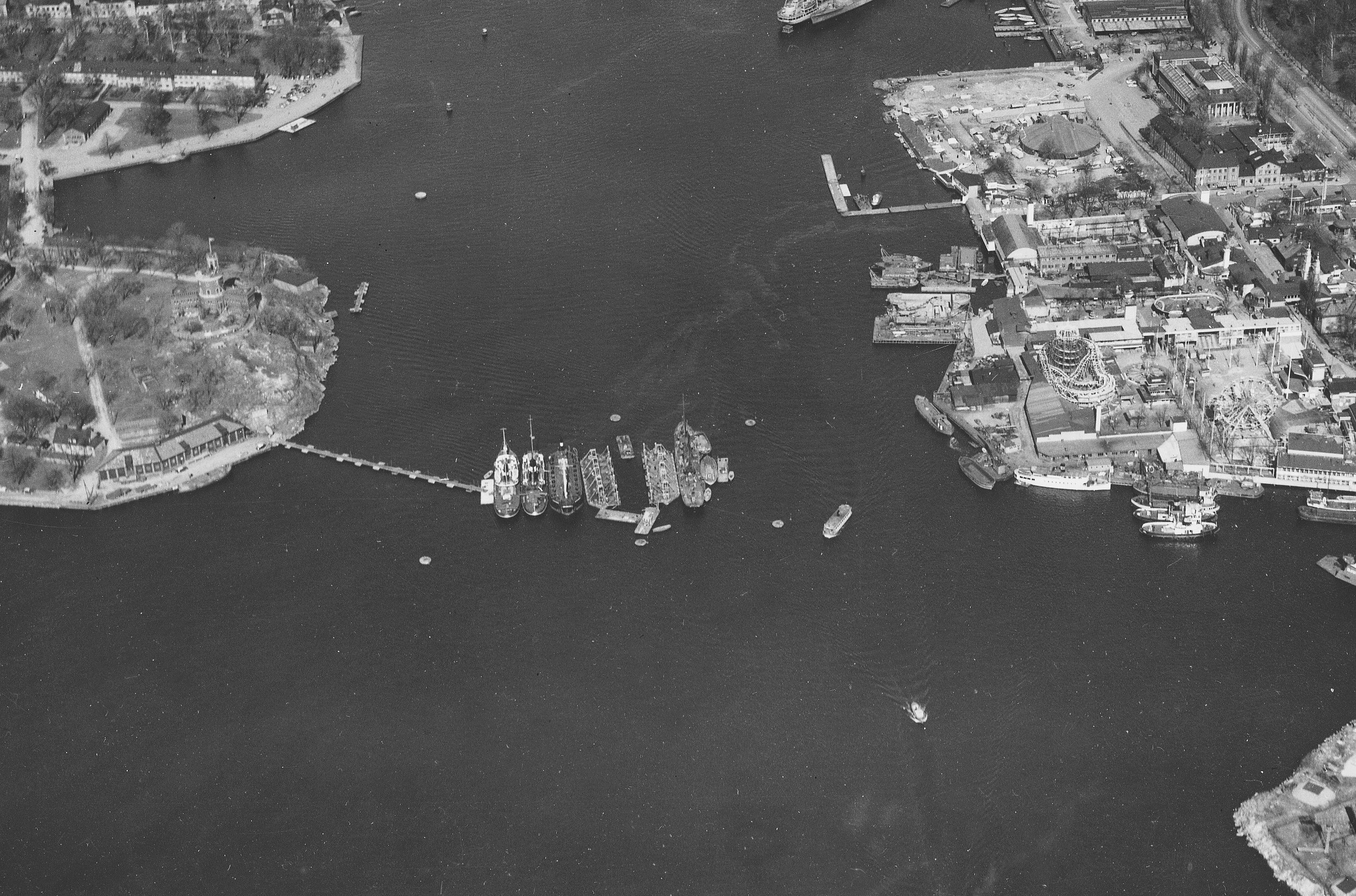 Kastellholmen (t.v.) och Gröna Lund, i mitten pågår bärgningen av Vasa